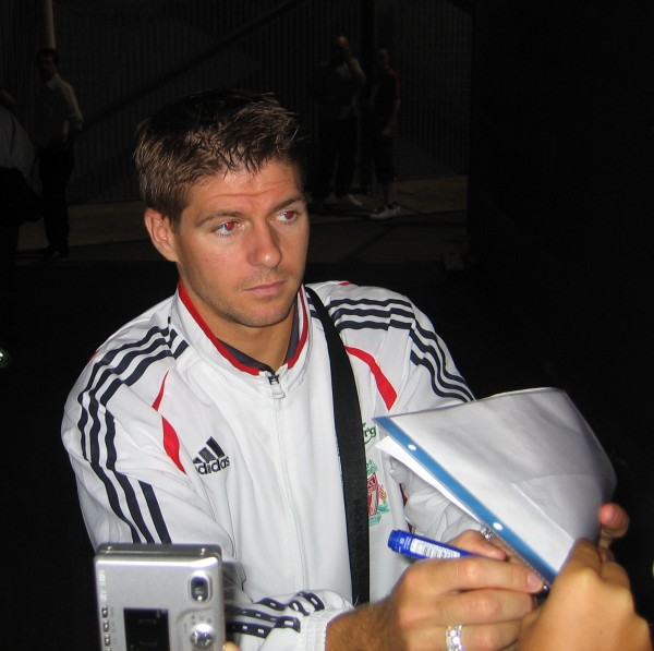 Steven Gerrard nach dem Freundschaftsspiel FSV Mainz 05 - FC Liverpool am 4. August 2006 in Mainz